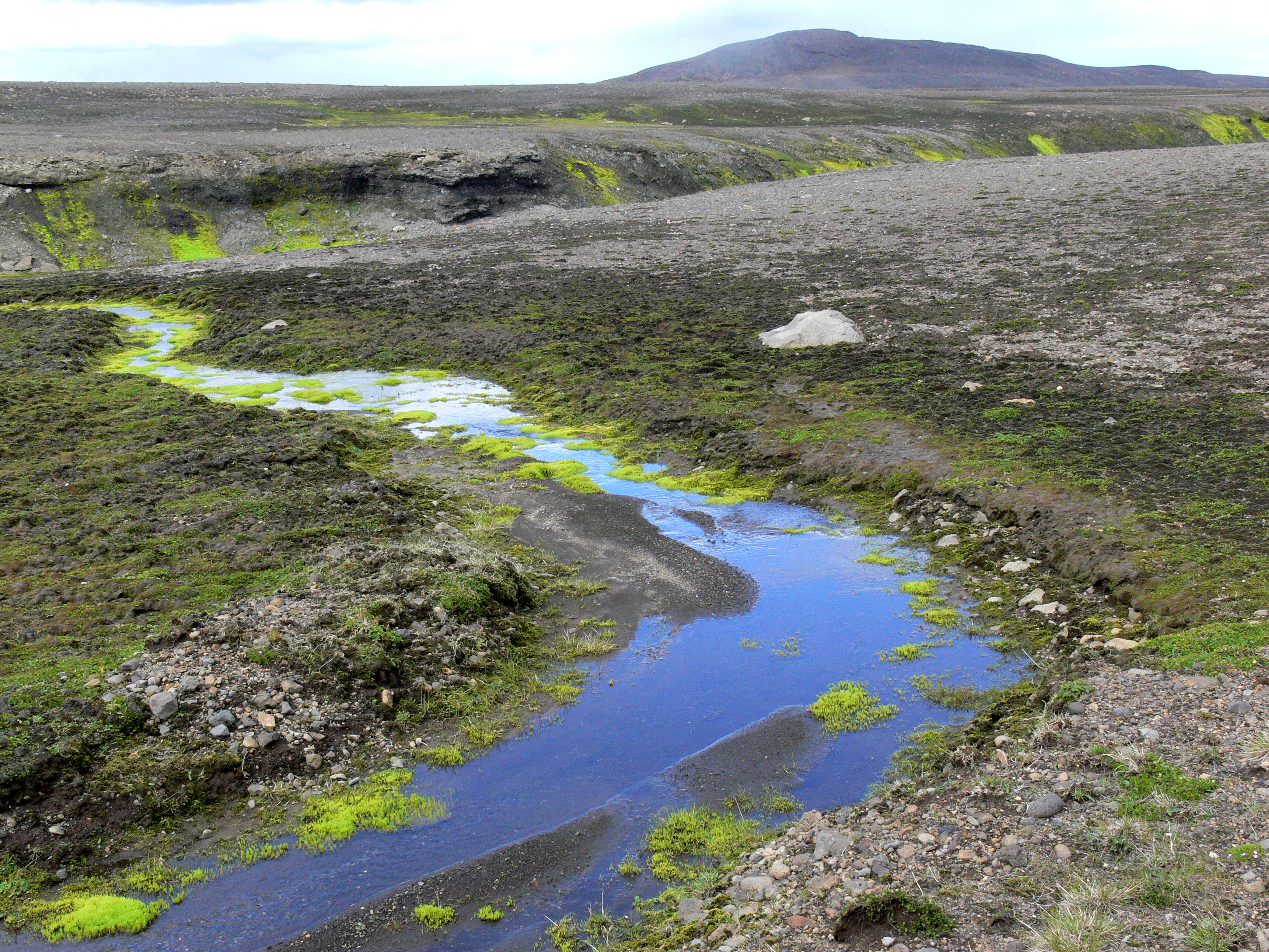 Moos in der Nähe von Snæfell in Ostisland.